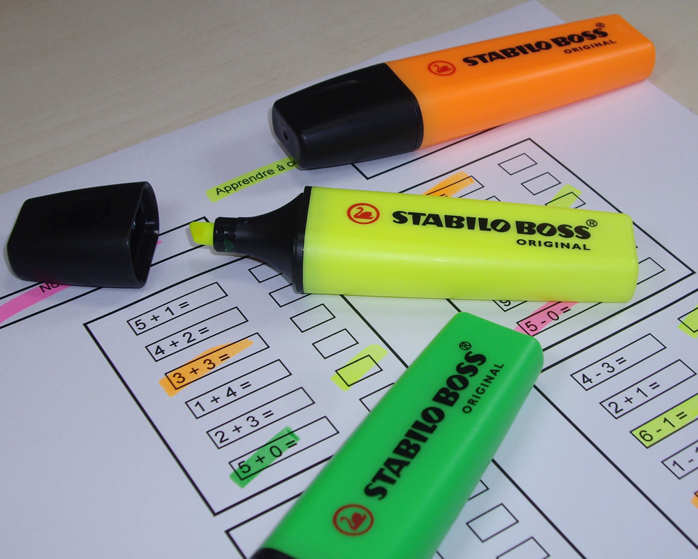 STABILO BOSS Original